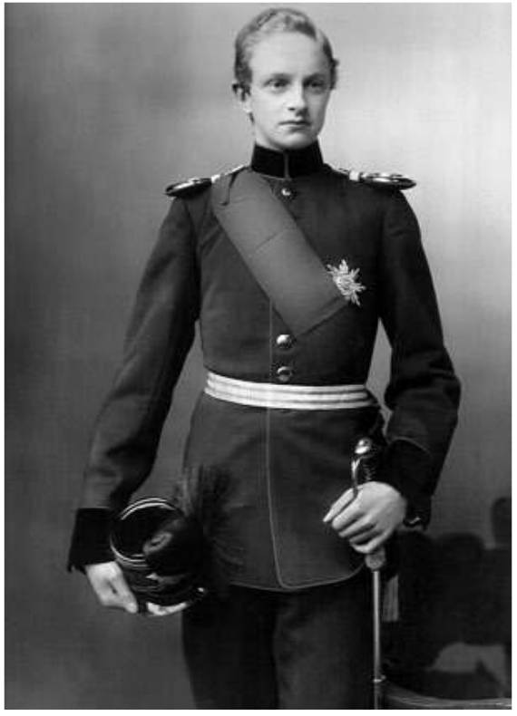 Prinz Johann Georg von Sachsen, Fotografie, um 1881